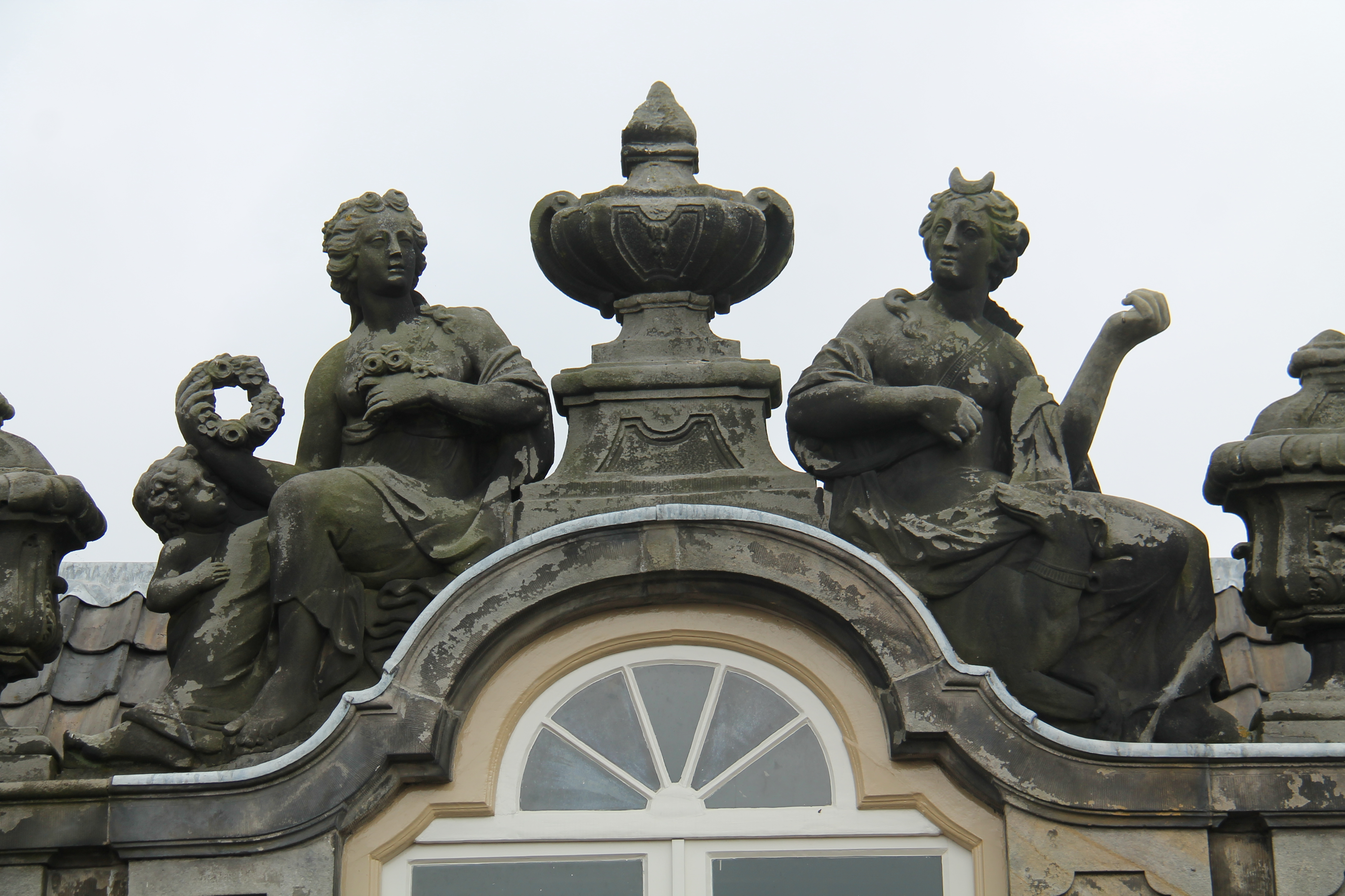 Bovenzijde van de dakkapel van Grote Oost 43 in Hoorn. Op de dakkapel zitten links Venus met haar zoon Cupido en rechts Diana. De linkerhand van Diana is in 2015/16 gerestaureerd.